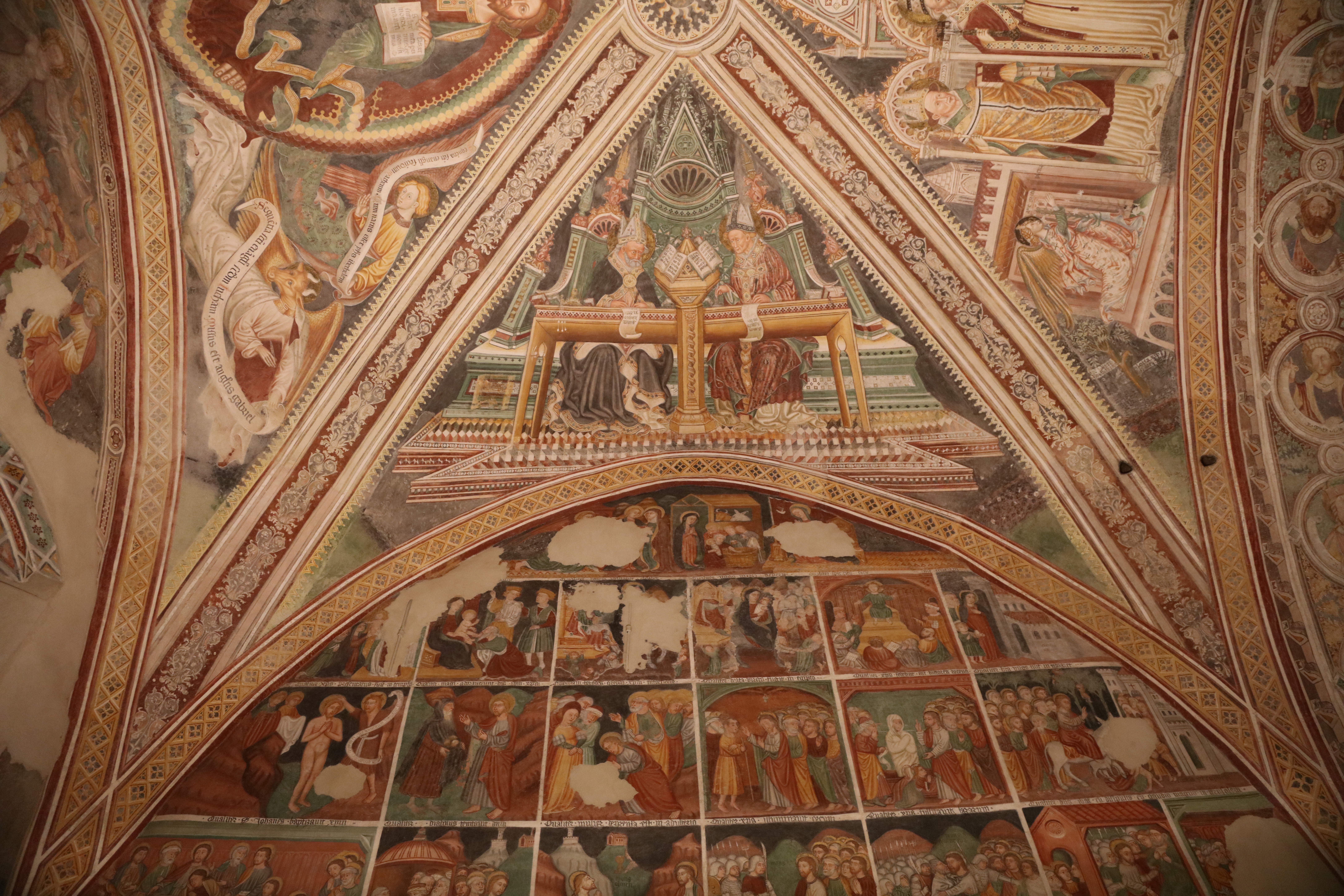 Die Fresken im Chor der Santa Maria della Misericordia